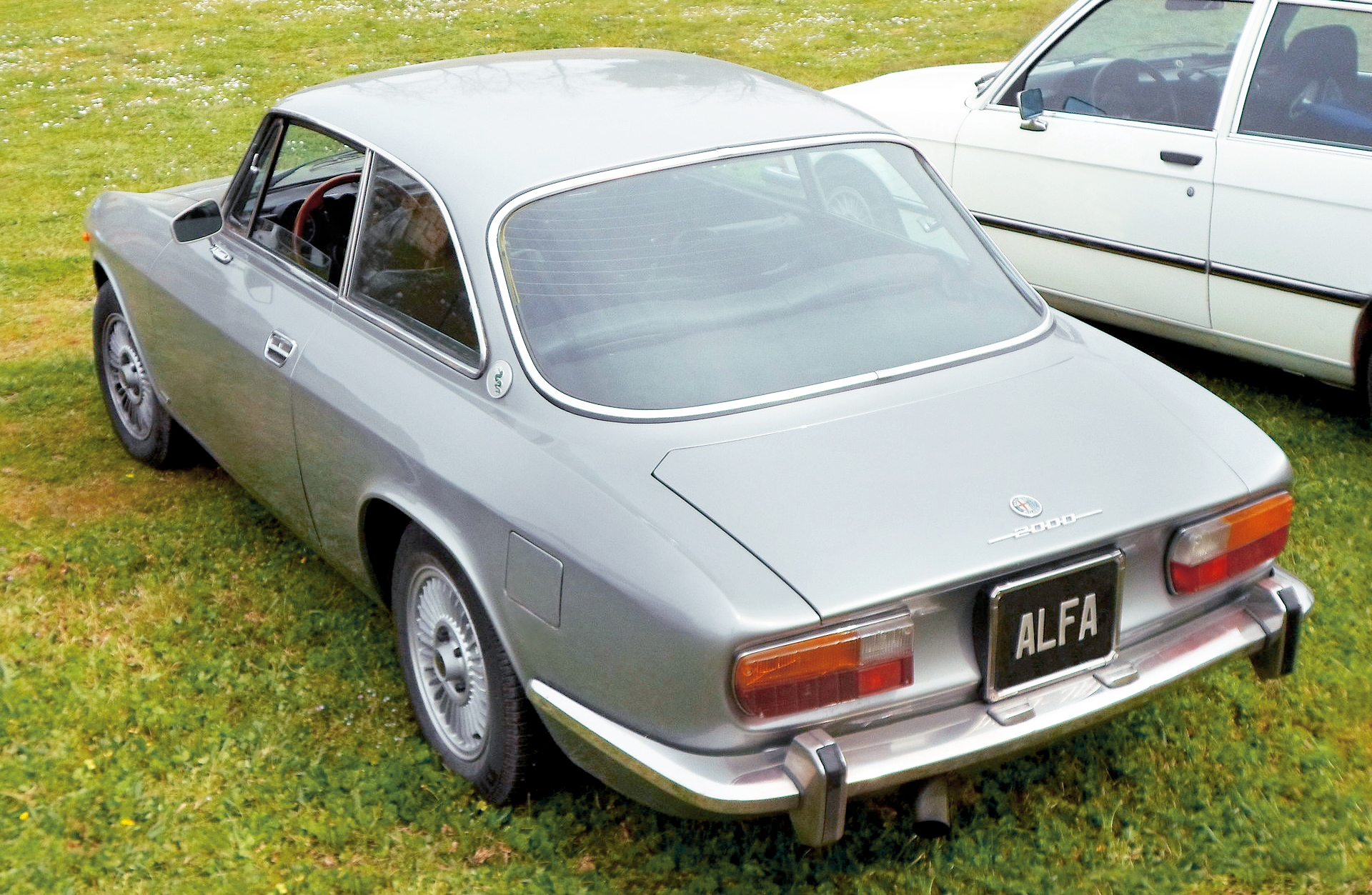 Alfa Romeo 2000 GT Veloce Blaye 2013